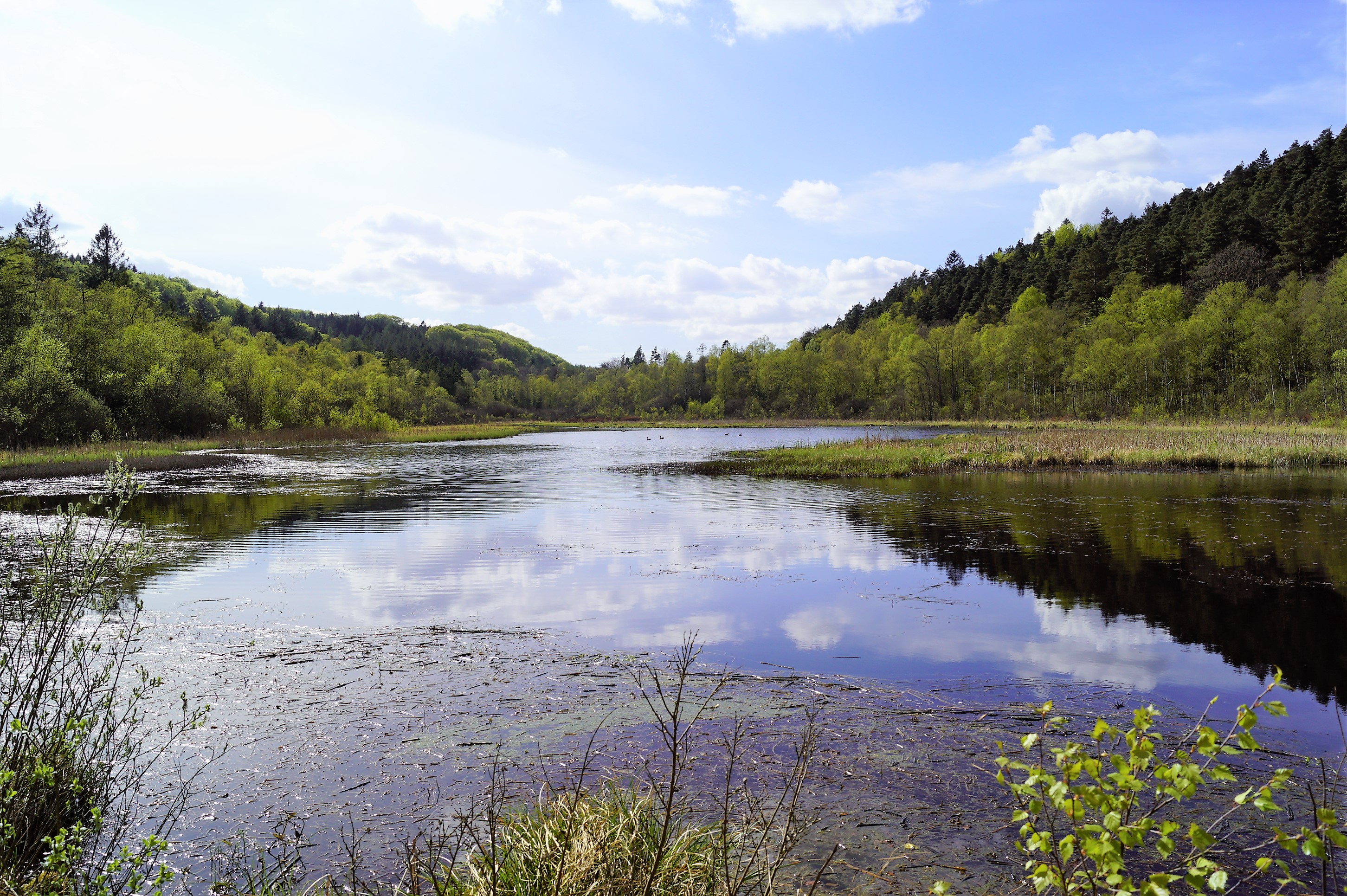 Jenskær Sø set mod vest